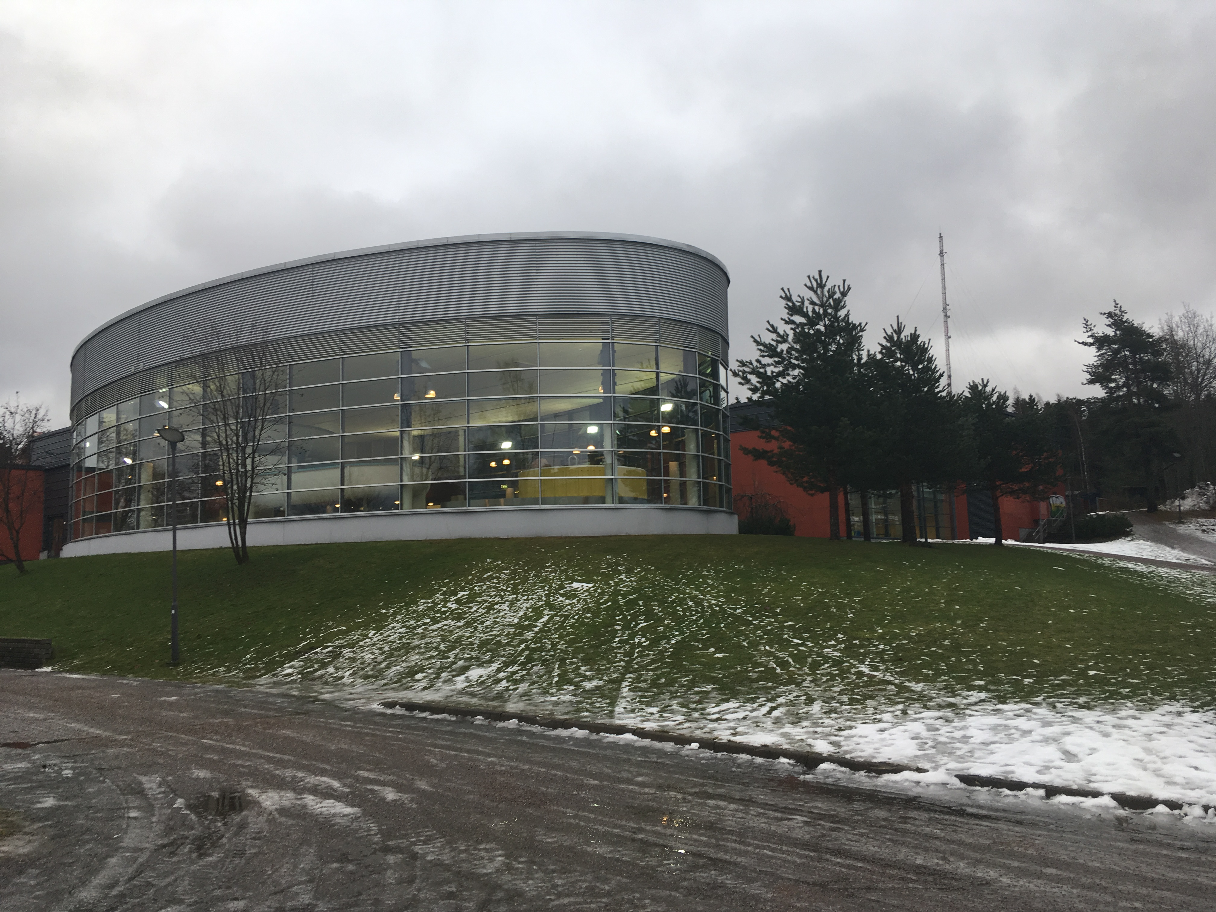 Porvoon Uimahalli tammikuussa 2018.